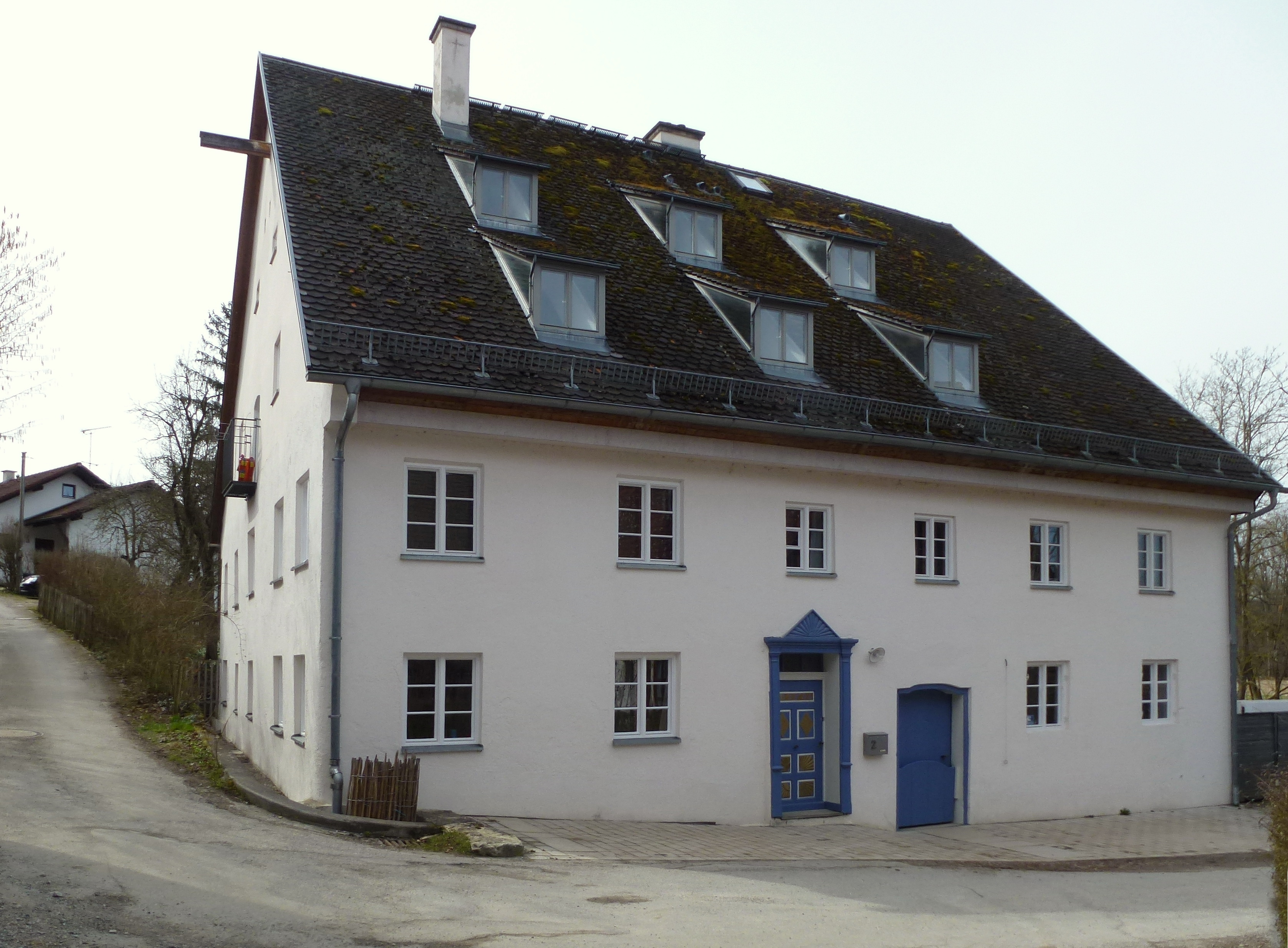 Windach, Mühlbachstr.2: Ansicht von Nord-Osten